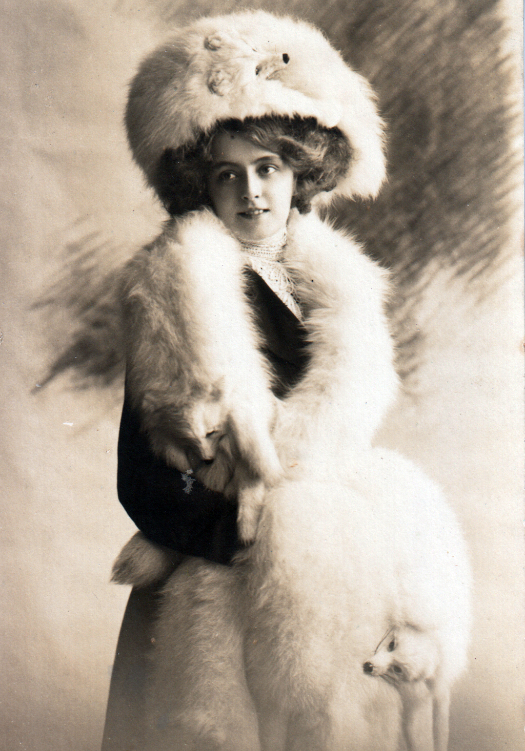 Postkarte, gelaufen am 14. März 1910, von Kirchhheim u. Teck (Poststempel) nach Niederstetten Junge Frau mit Polarfuchshut, Polarfuchskollier und Polarfuchsmuff, alle jeweils in üppiger Größe mit naturalisiertem Kopf. Gemarkt mit R&K L. 4015/3